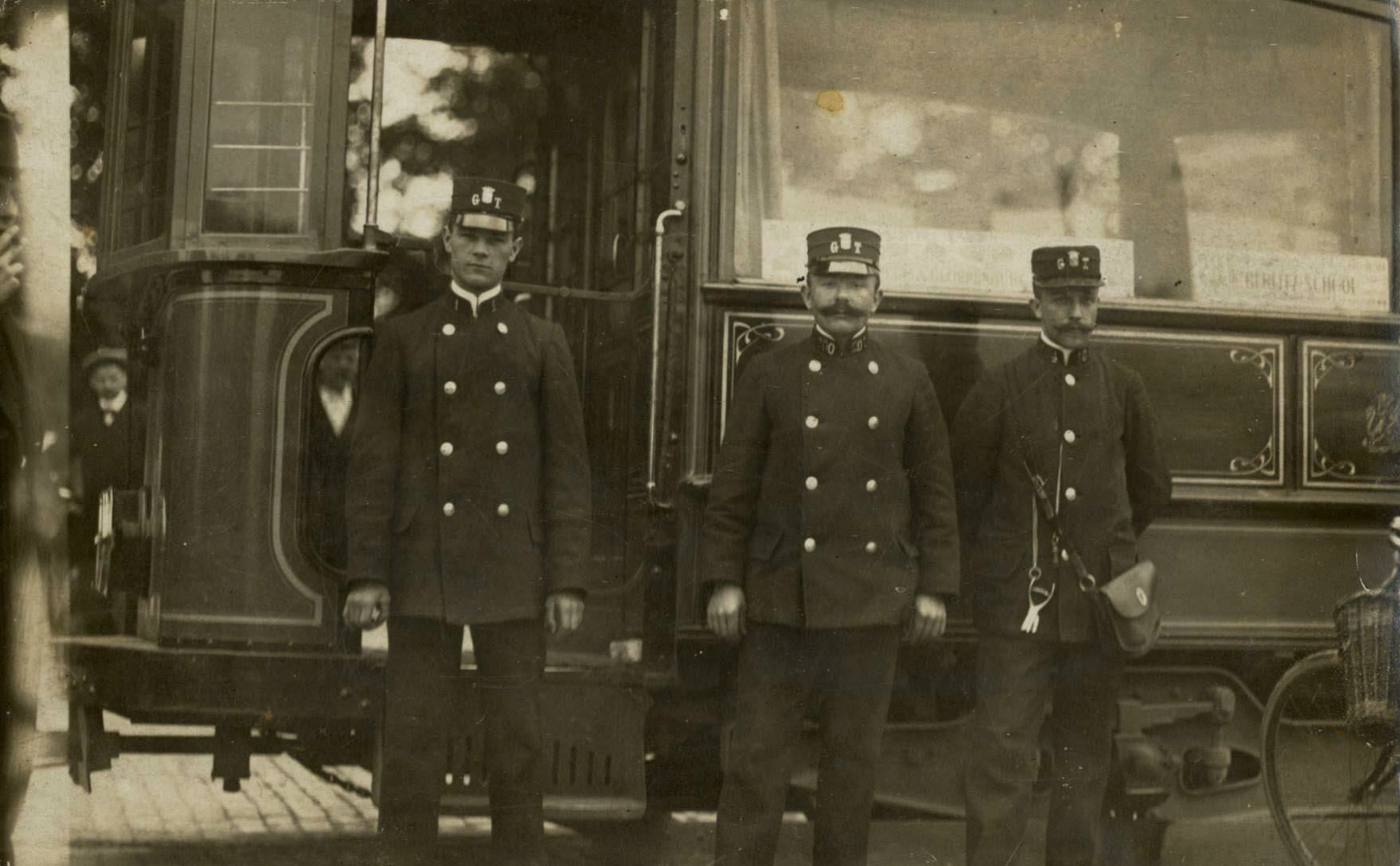 Bestuurders en conducteur van de Gemeentetram Utrecht poseren. Vervaardiger onbekend. Gelet op artikel 38 van de Auteurswet 1912 en de nadere invulling daarvan zoals verduidelijkt onder punt 1.1.5.12 van de Juridische wegwijzer archieven en musea online en de discussie hier is het auteursrecht op deze afbeelding vervallen vanaf 1 januari 2006.